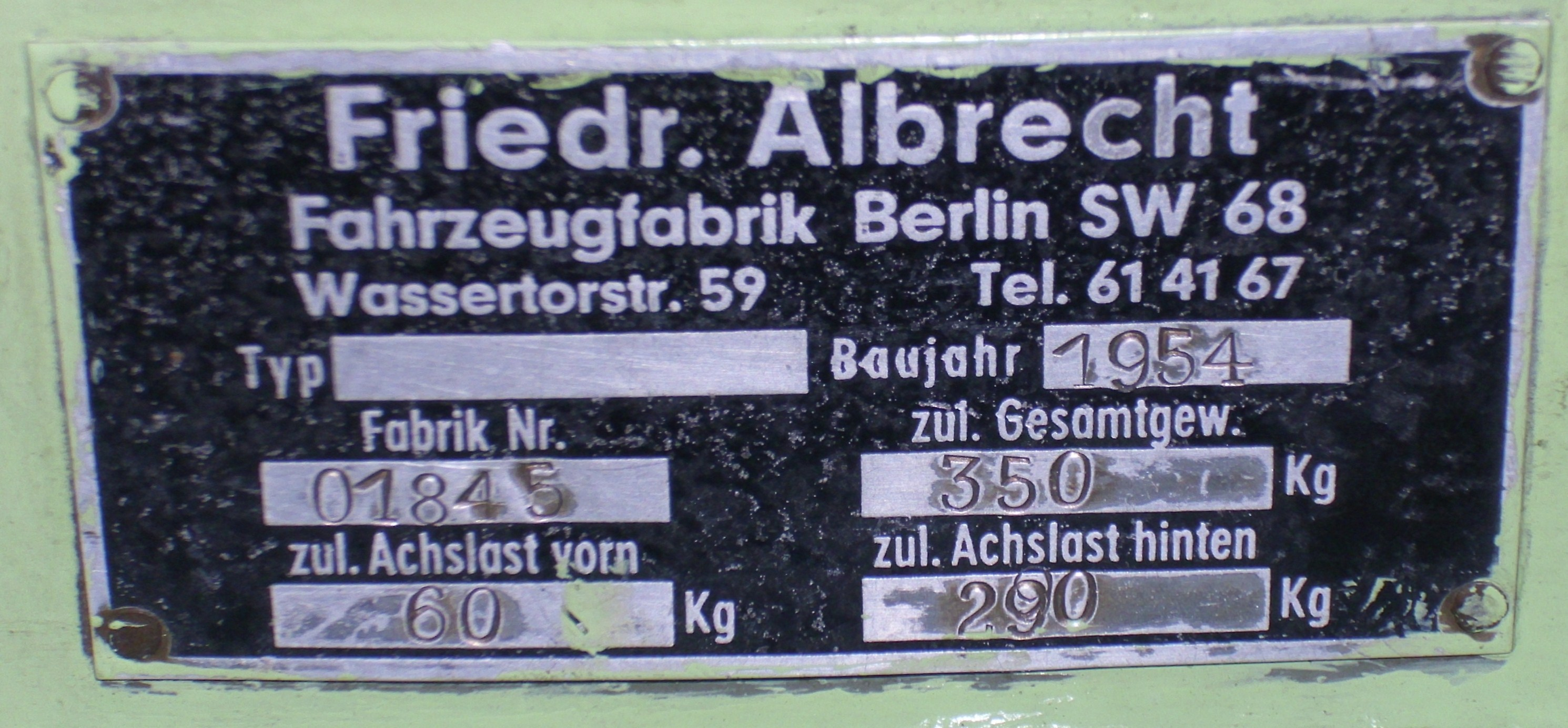 Emblem Albrecht